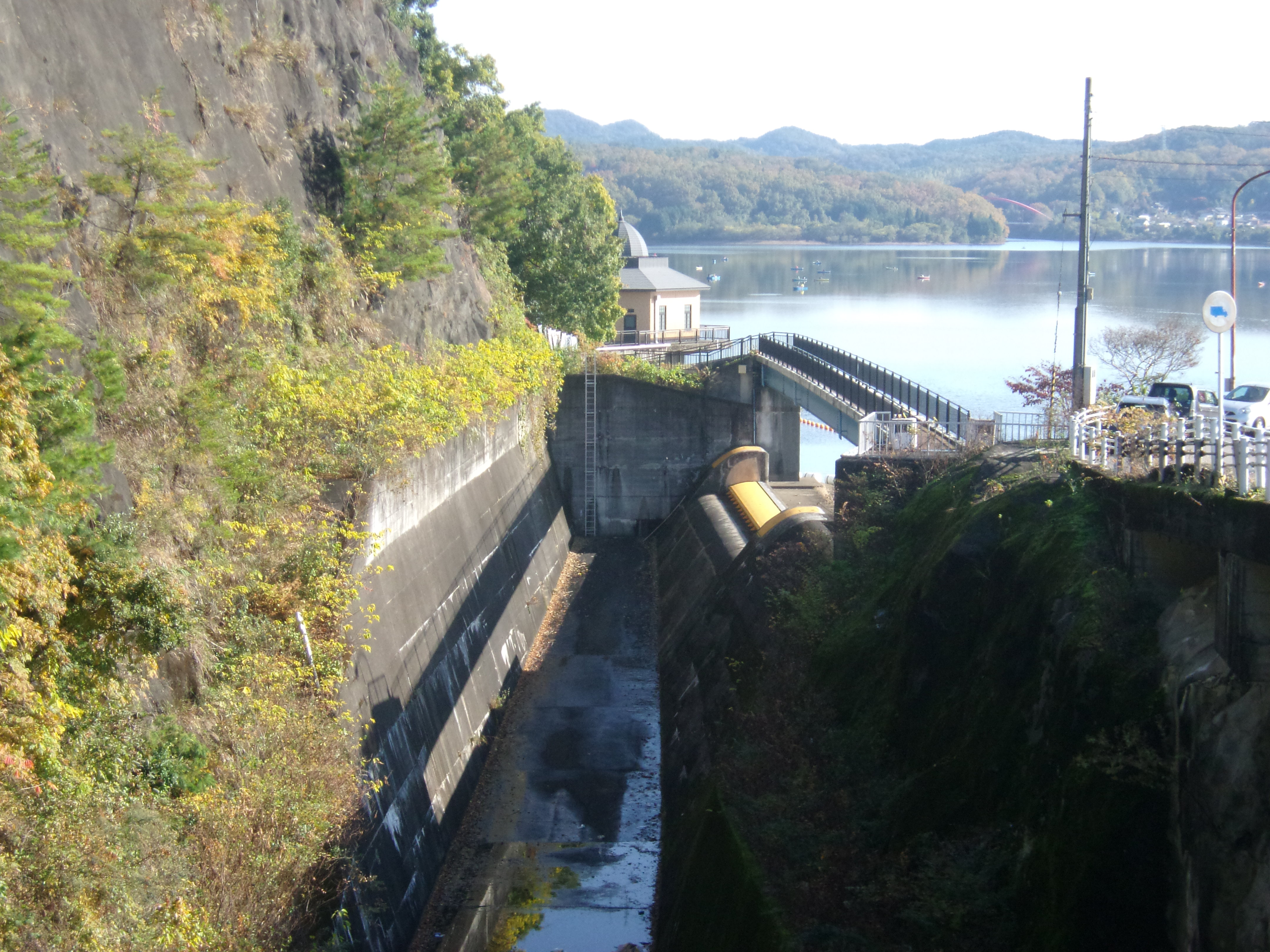 愛知県犬山市の入鹿池から愛知用水への水門と導水路